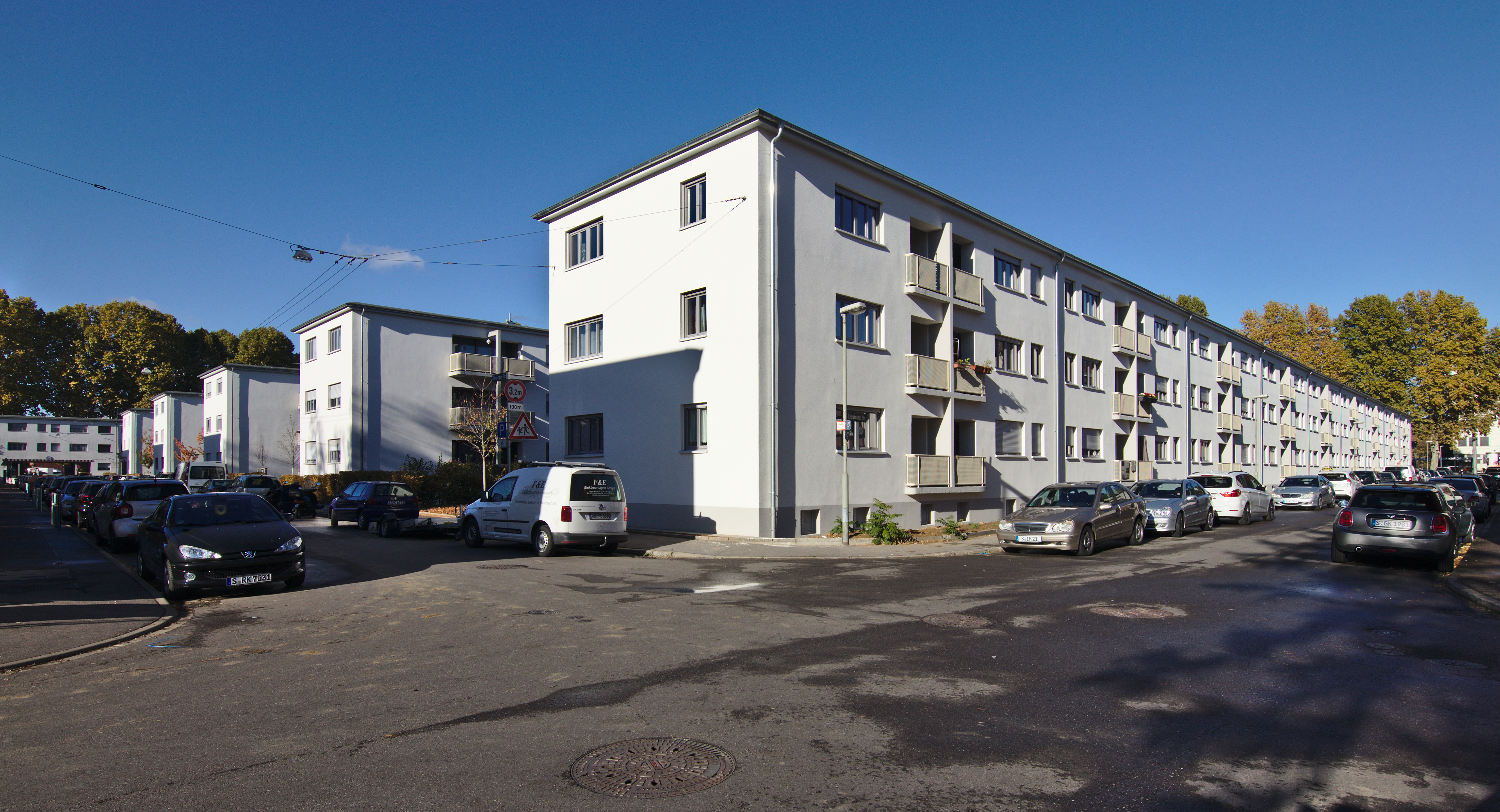 Inselsiedlung in Stuttgart-Wangen, Deutschland.. Ebersbacher Straße 15 aufwärts. Links Geislinger Straße.